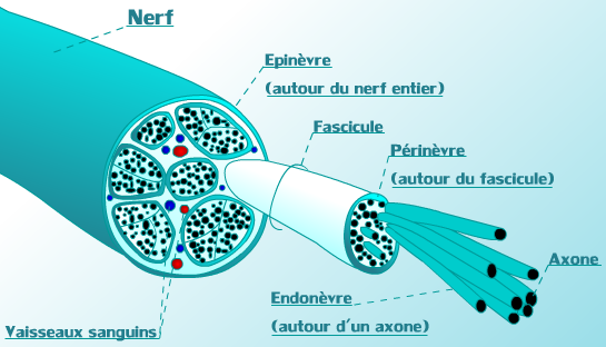 Ceci est le schéma d'un Nerf coupé.